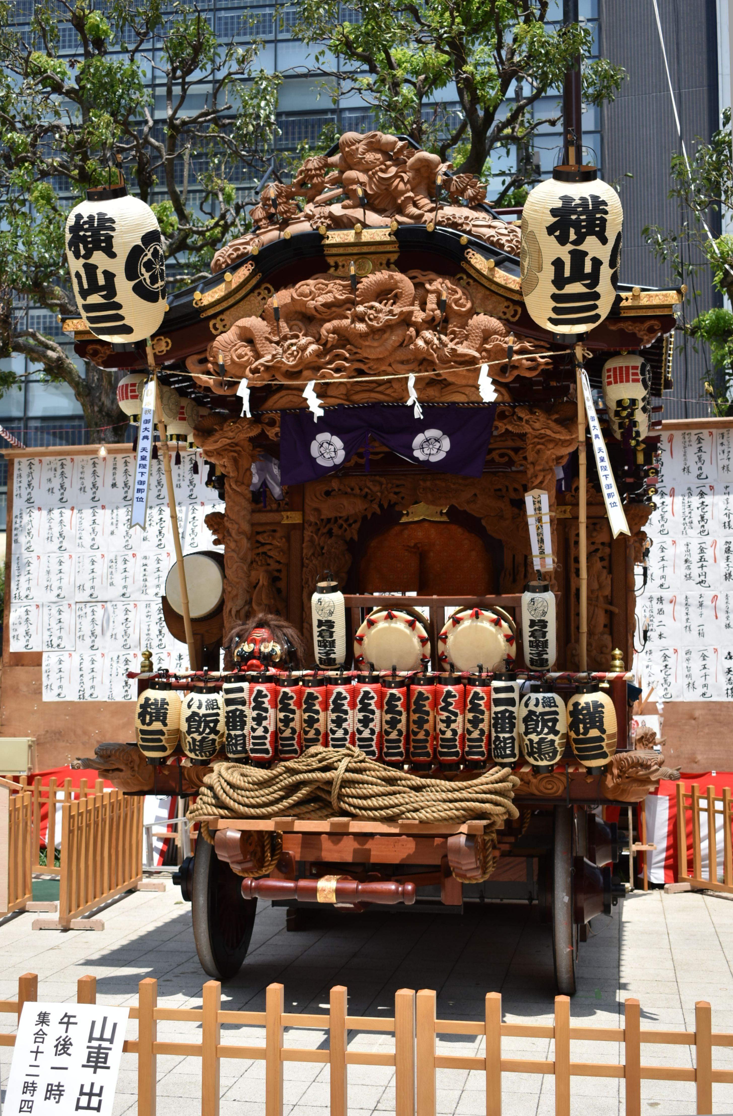 八王子まつり